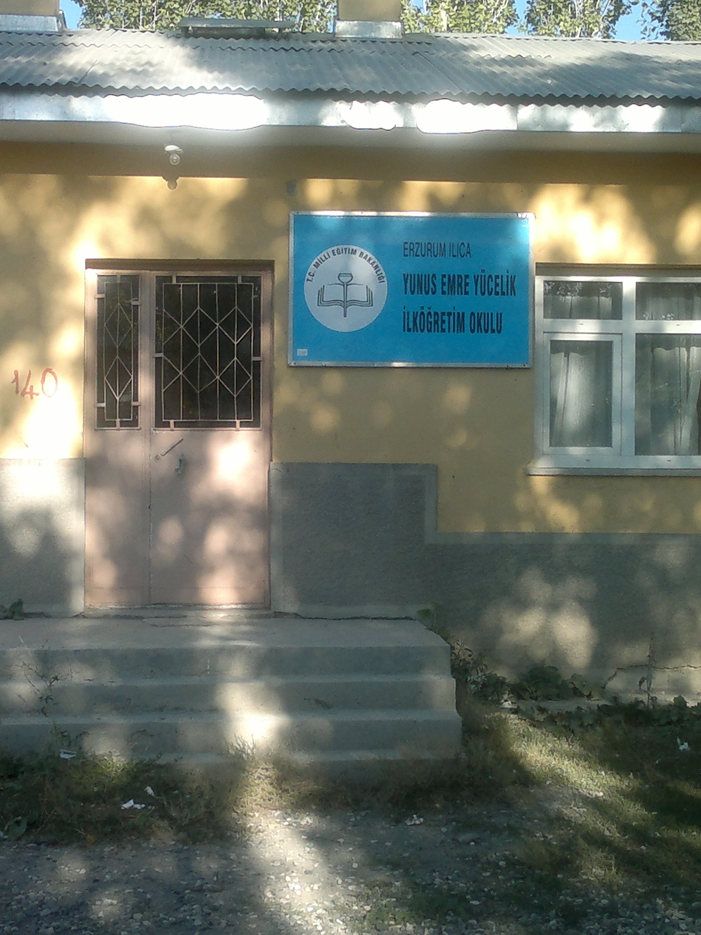 Türkiye'de Erzurum ili merkez Aziziye (eski adı:Ilıca) ilçesine bağlı Alaca köyü ilkokulu